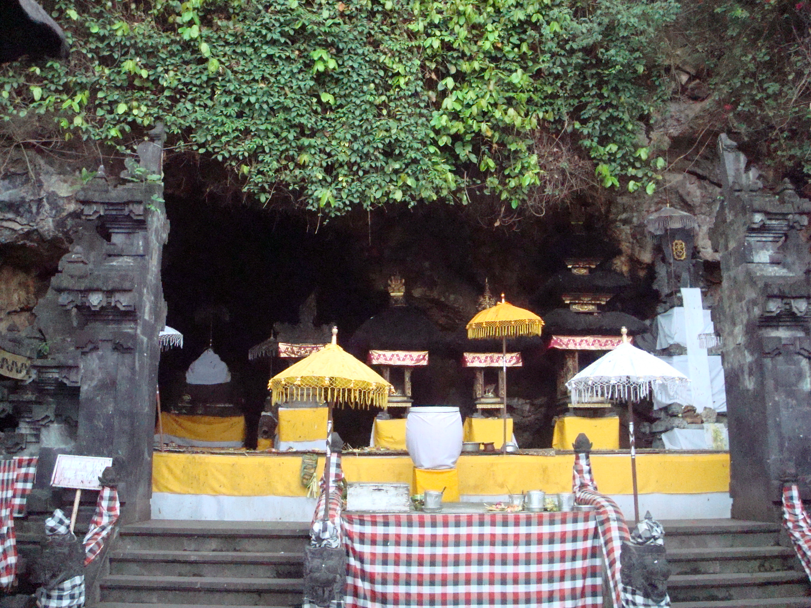 Tempel Goa Lawah